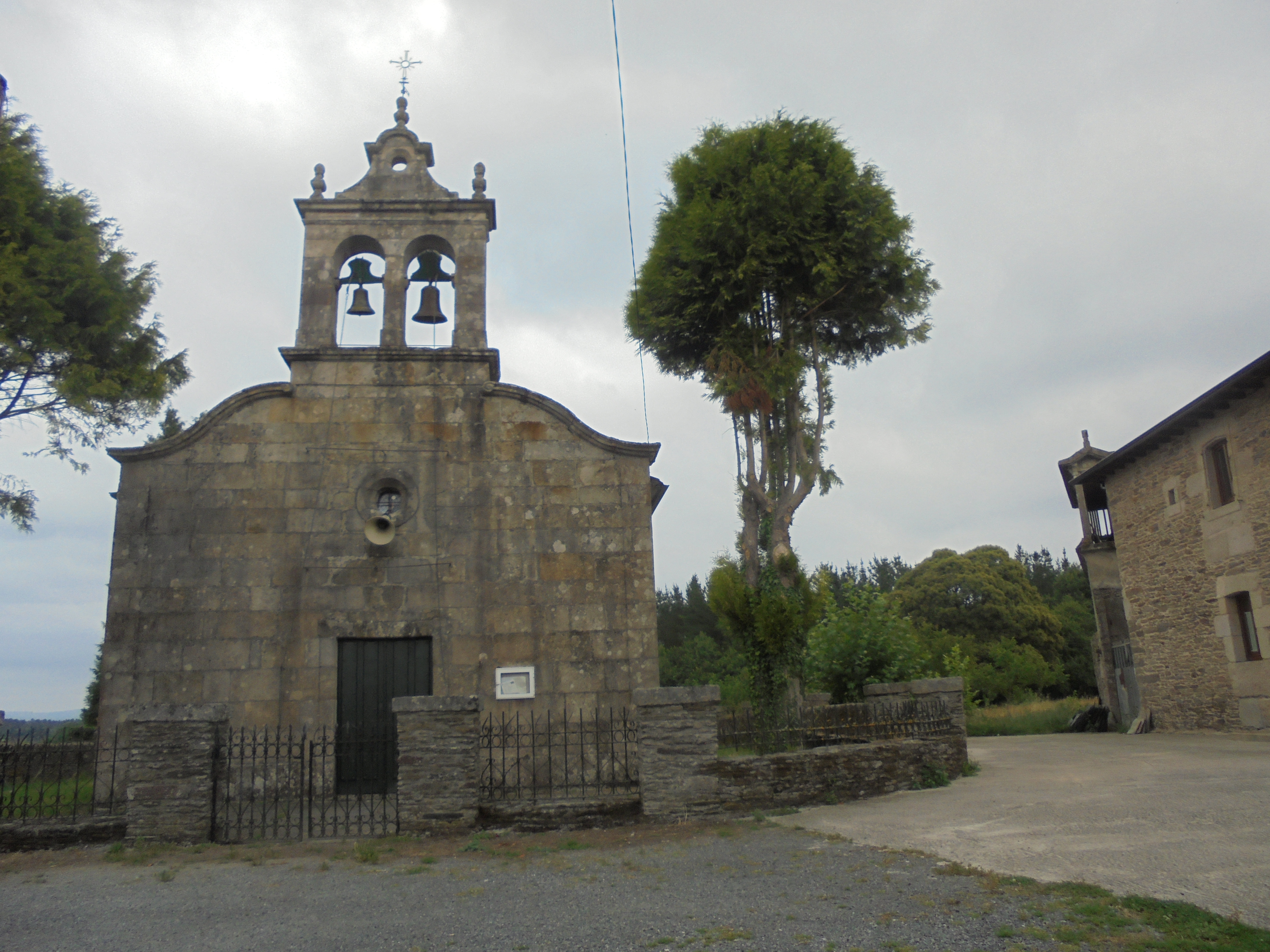 Igrexa de San Pedro de Farnadeiros ( O Corgo)